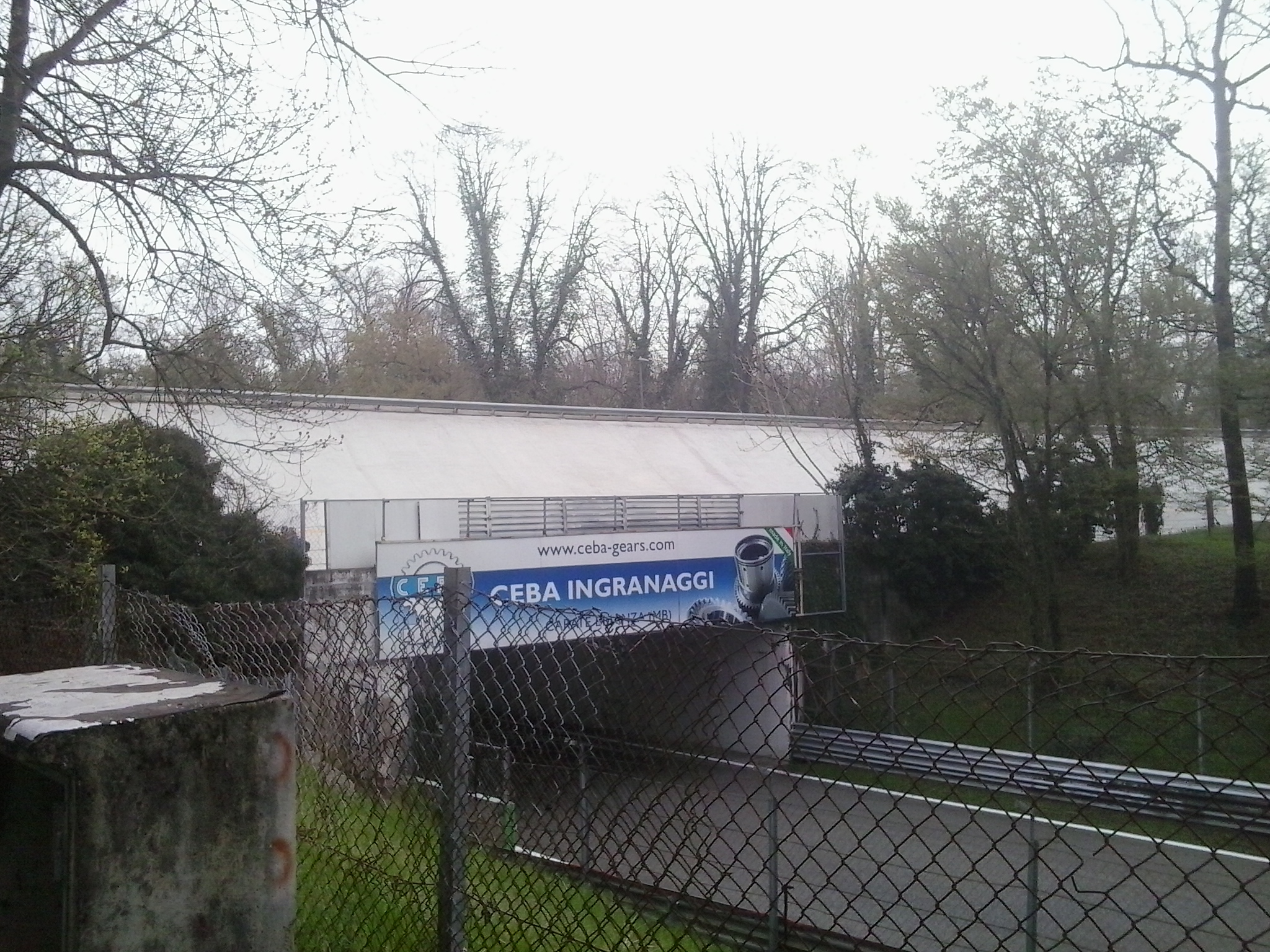 Sopraelevata dell'Autodromo nazionale di Monza